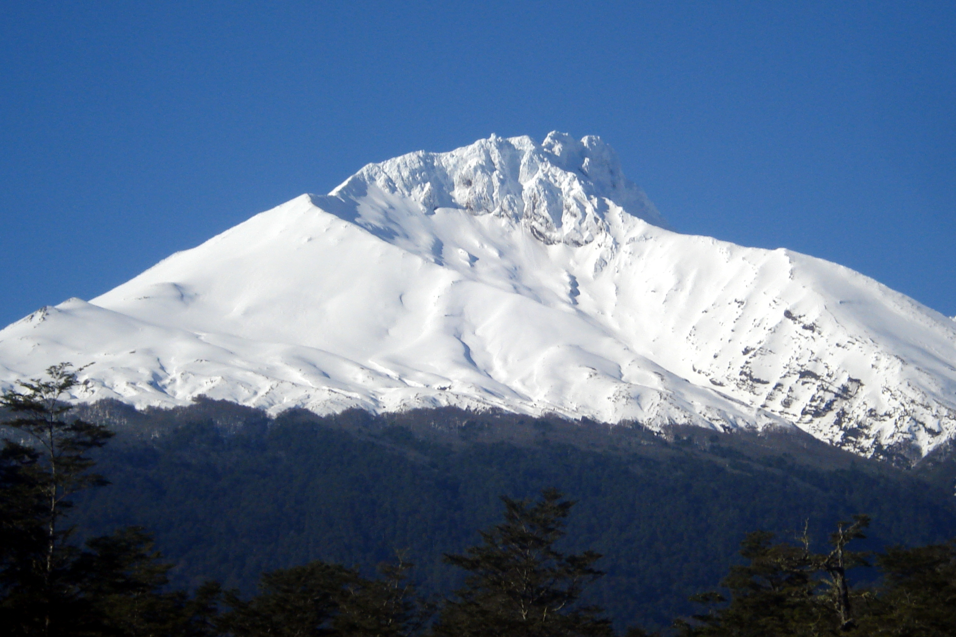 Cumbre del volcán Choshuenco.